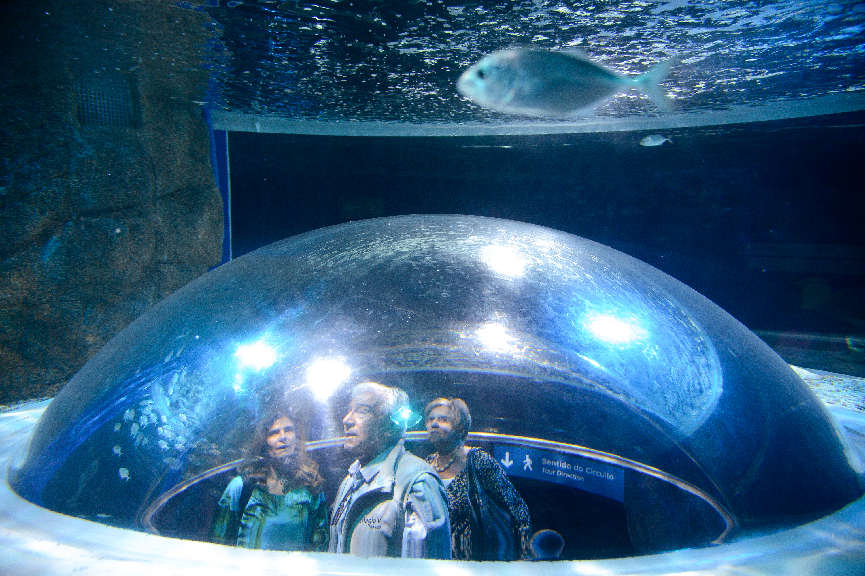 Rio de Janeiro - Em evento no AquaRio a ONU Meio Ambiente lança a campanha mundial "Mares Limpos", que durante cinco anos terá ações para conter a maré de plásticos que invade os oceanos (Tânia Rêgo/Agência Brasil)